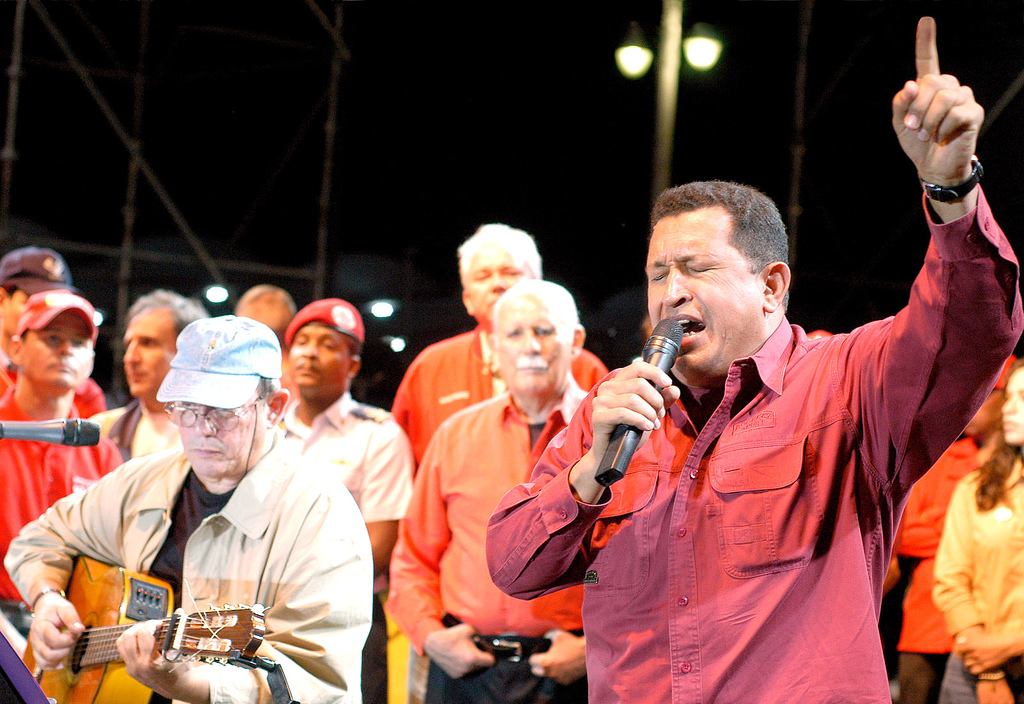 El presidente Chavez interpreta una canción con el trovador cubano Silvio Rodriguez en los alrededores del Fuerte Tiuna.